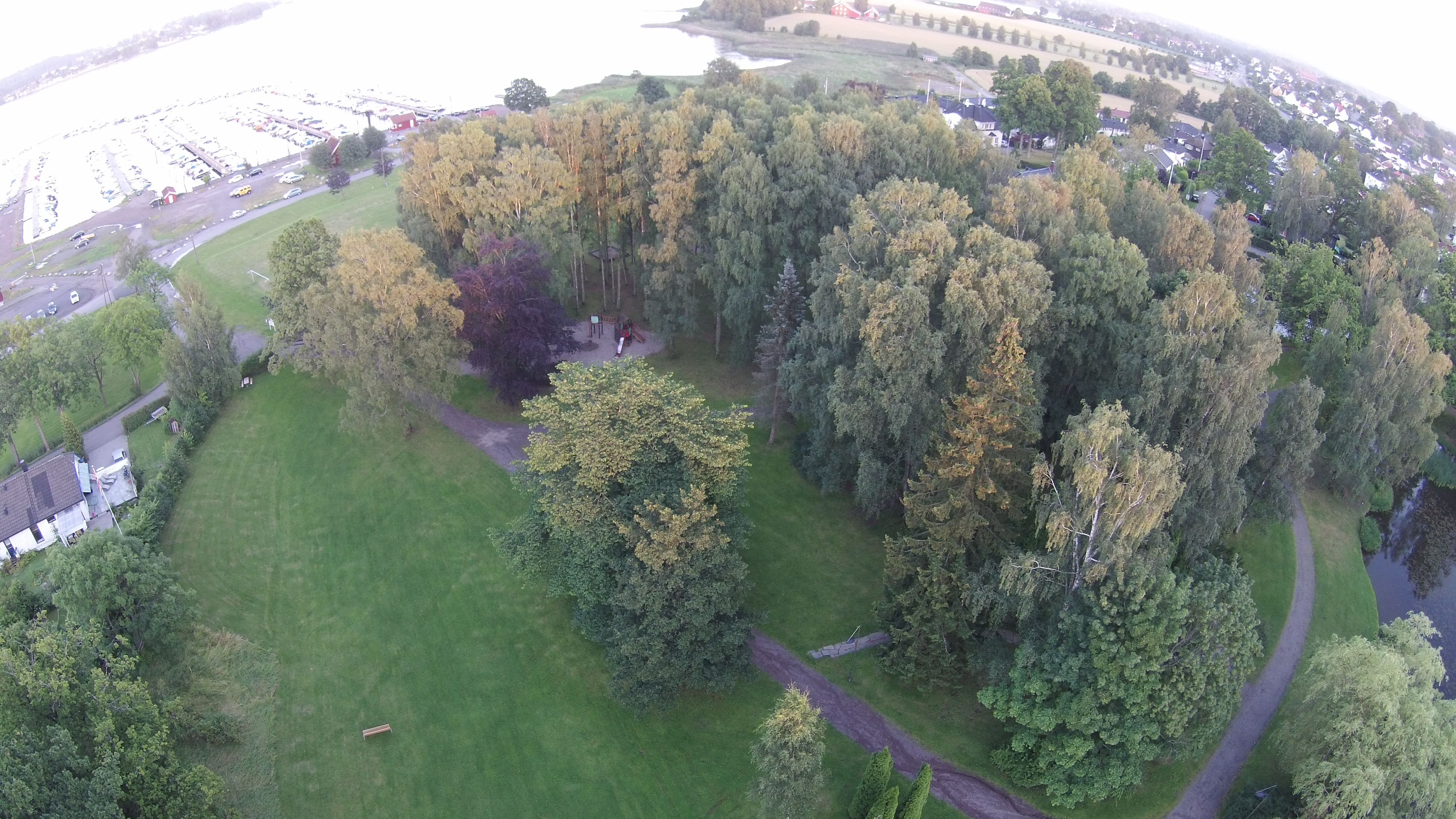 Rosanesparken sett fra luften